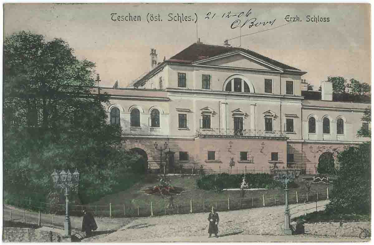 Vue de Cieszyn (Teschen ) vers 1906.